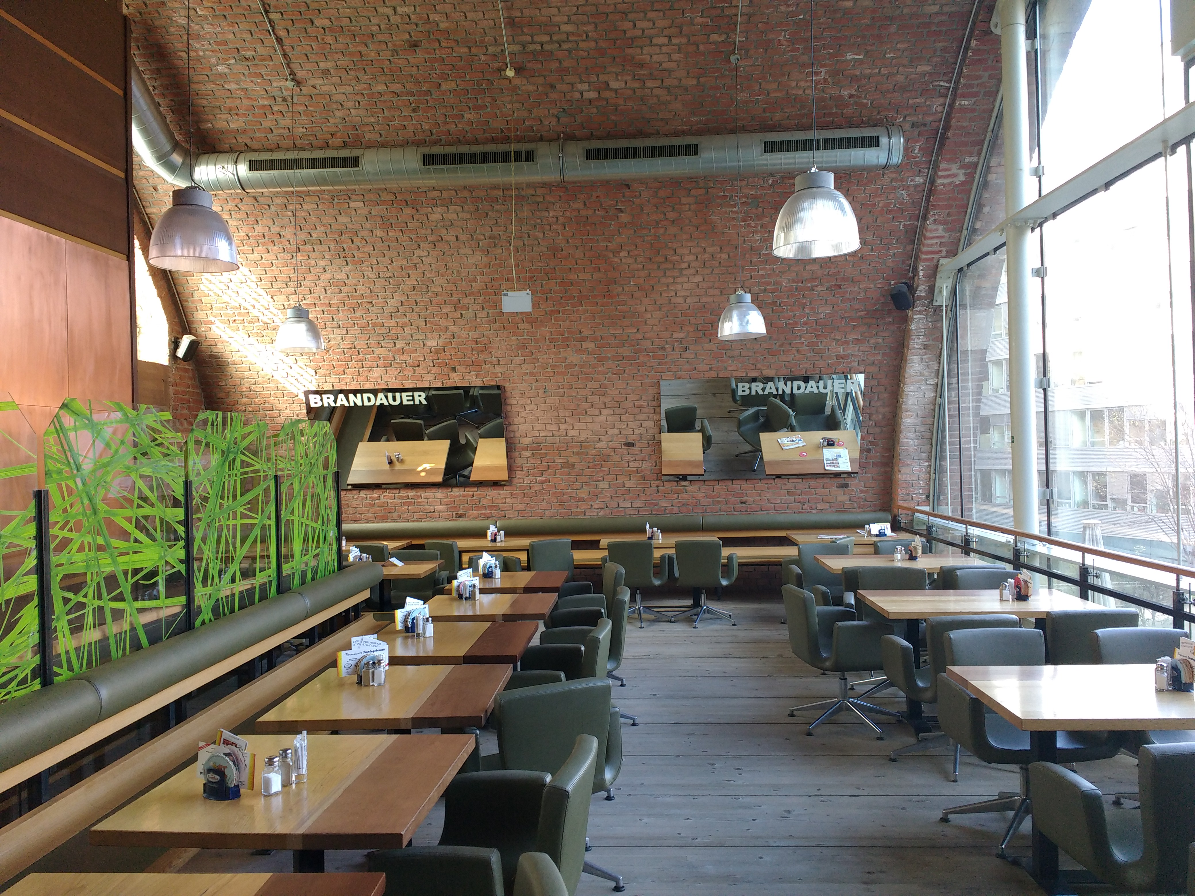 Brandauers Bierbögen in den Stadtbahnbögen 204–216 Dieses Bild wurde anlässlich des österreichischen Tags des Denkmals 2017 in Wien eingereicht. Diese Datei wurde im Rahmen von WikiDaheim 2017 in Österreich erstellt und hochgeladen.Sie wurde dem Themenbereich Denkmalschutz zugeordnet.